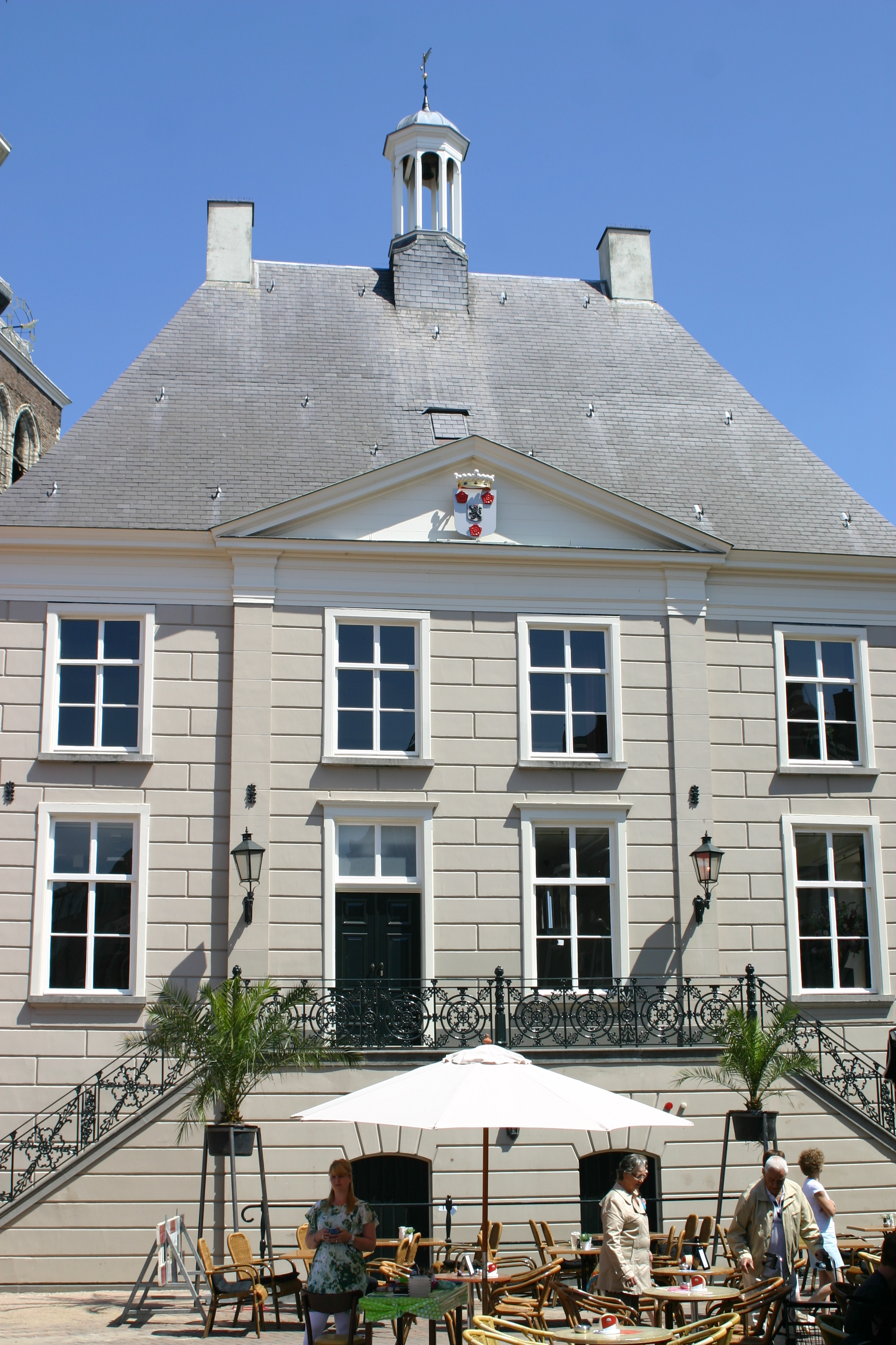 Zicht op een deel van het Raadhuis van Roosendaal, Markt 1